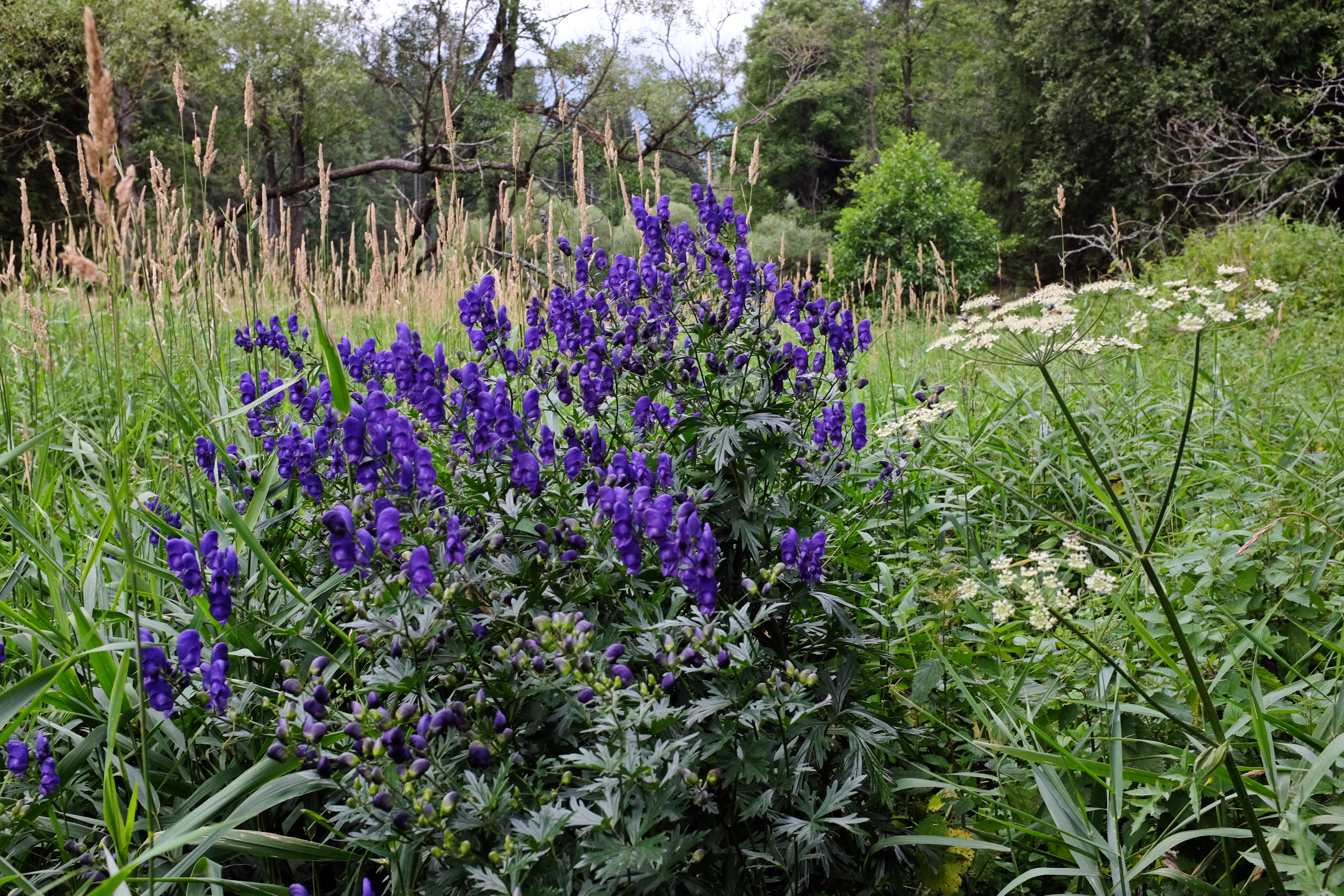 Aconitum plicatum (oměj šalamounek), niva Mnichovského potoka u naučné stezky Siardův pramen, Slavkovský les, okres Cheb